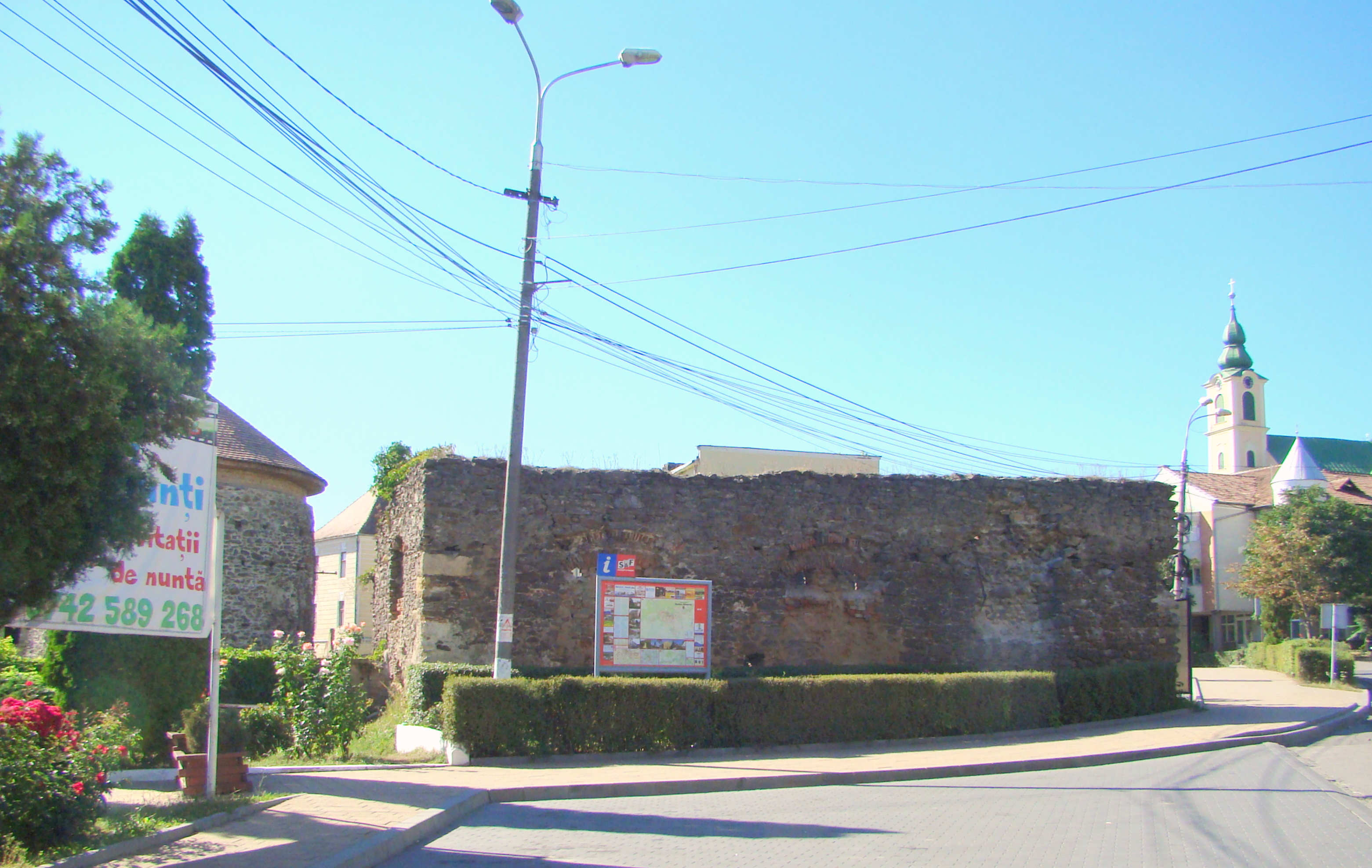 Zid de incintă, oraș Șimleu Silvaniei, Str. Bathory Stefanus 1 02